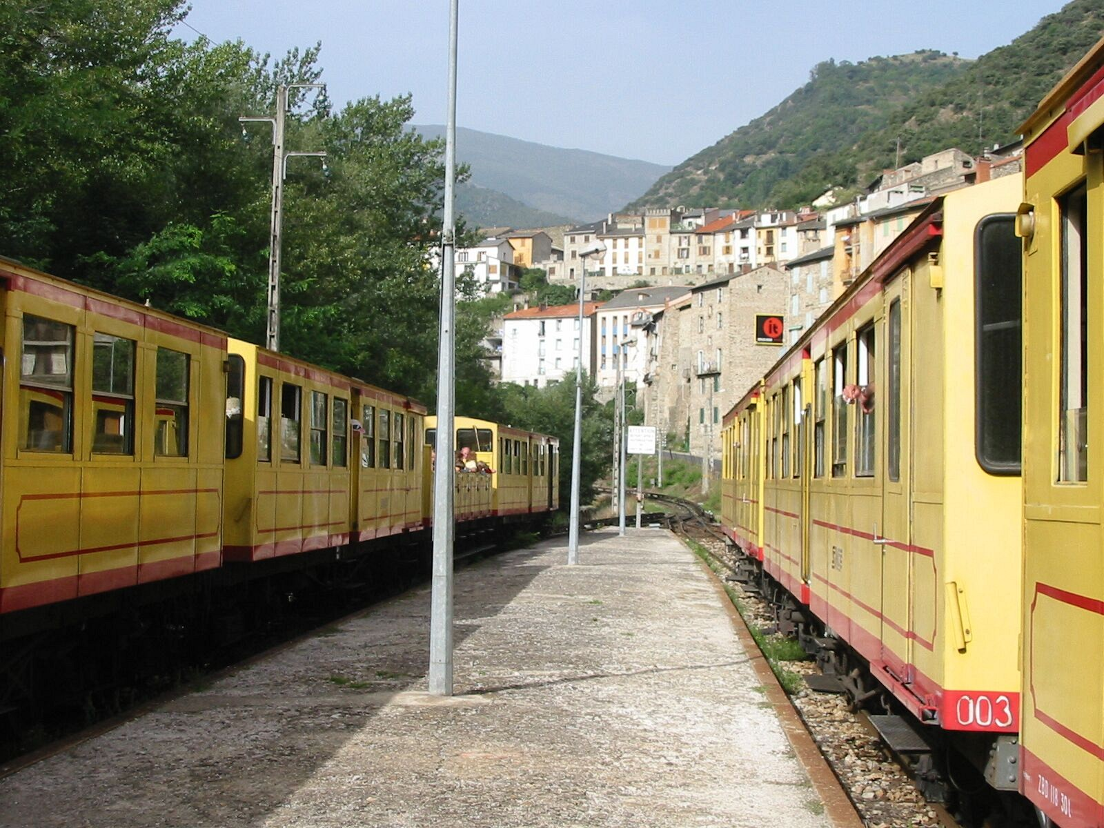 Gare d'Olette avec croisement de trains jaunes, Pyrénées-Orientales, France